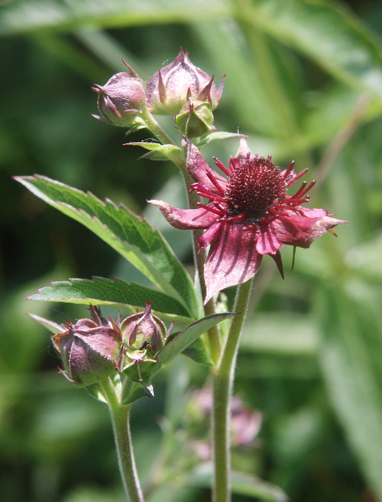 Comarum palustre (syn. Potentilla palustris), Virngrund, Germany